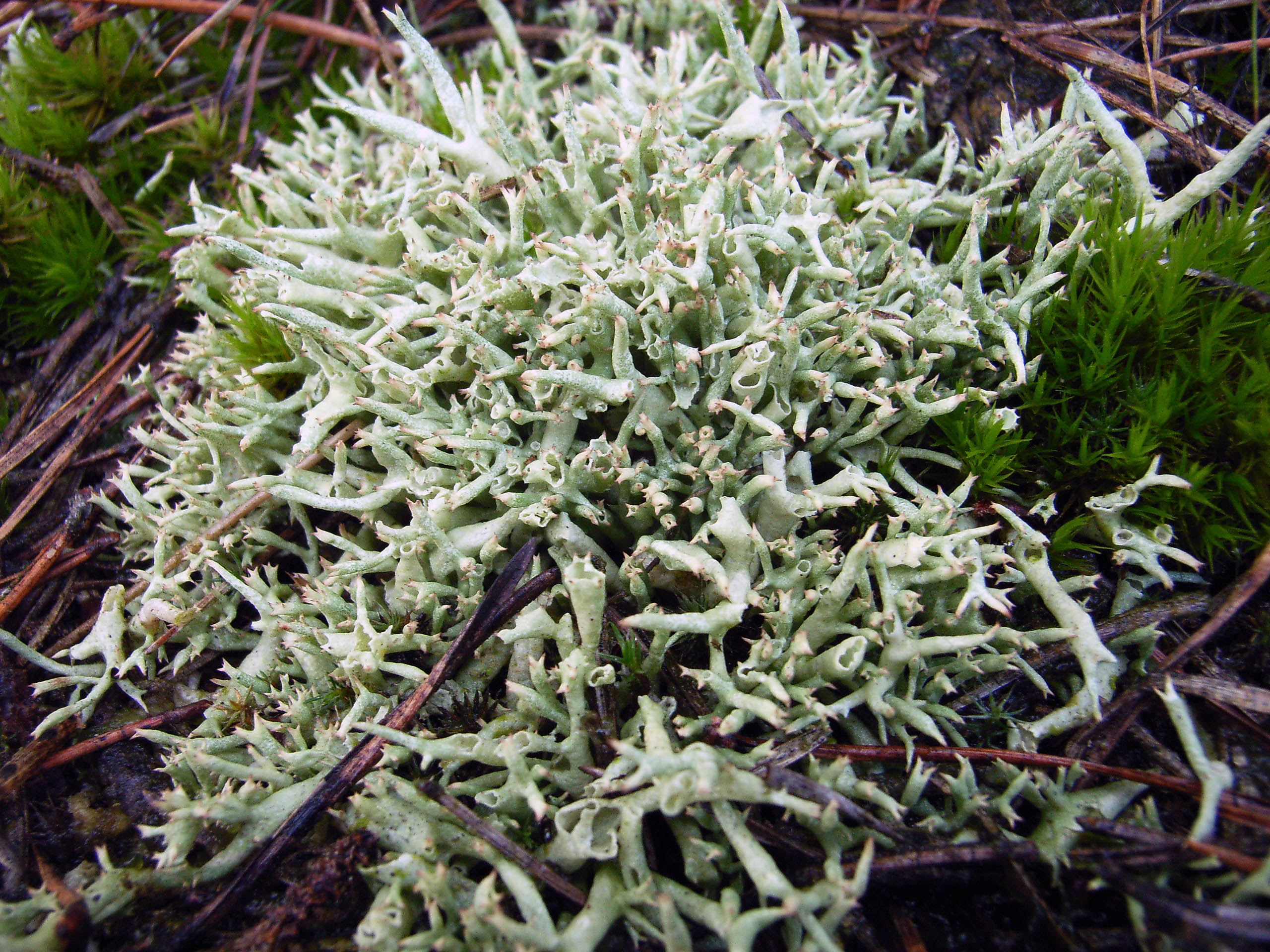 Igel-Cladonie (Cladonia uncialis), Binnendüne in Nordwestdeutschland